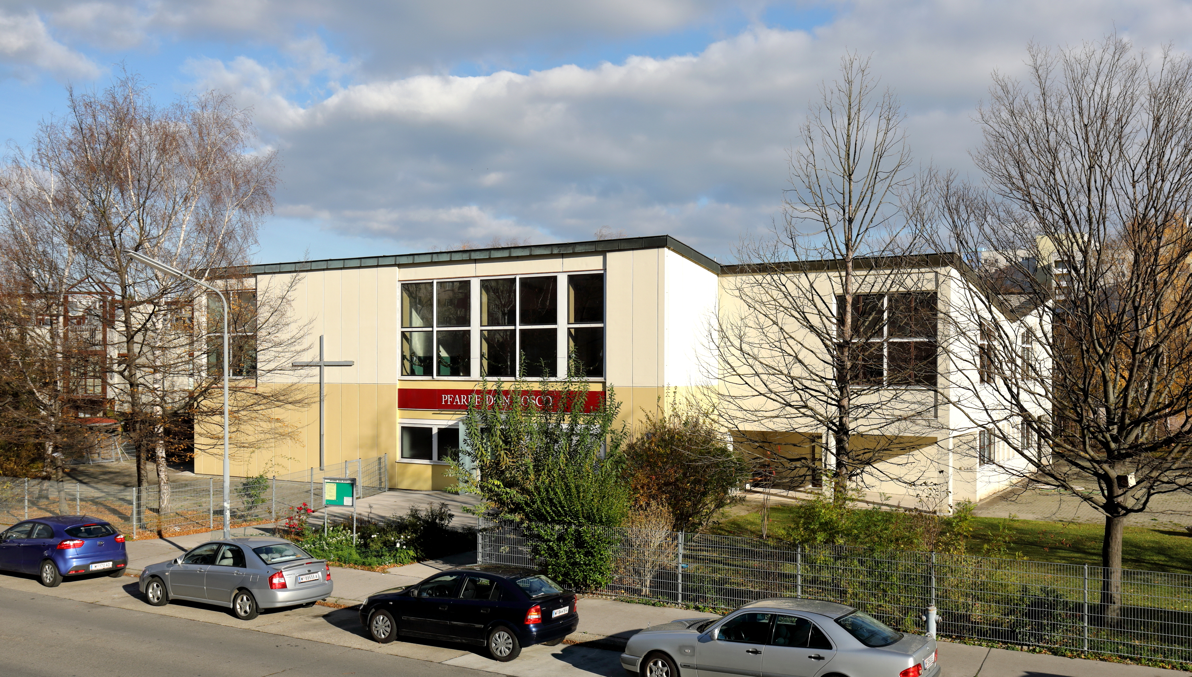 Westansicht der röm.-kath. Pfarrkirche Don Bosko mit dem südseitig angebauten Pfarrzentrum in der Herzmanovsky-Orlando-Gasse im 21. Wiener Gemeindebezirk Floridsdorf. Die Kirche wurde nach Plänen des Architekten Clemens Holzmeister ab 1970 im Osten der neugebauten Großfeldsiedlung errichtet und am 28. November 1971 durch Bischof Franz Jachym geweiht.